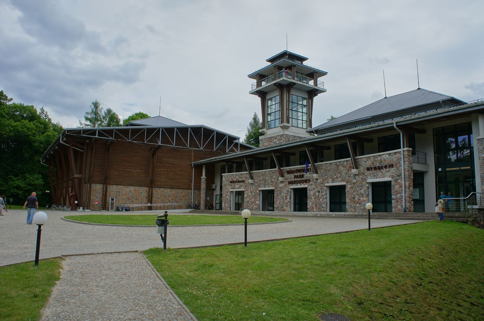 Białowieża, Poland